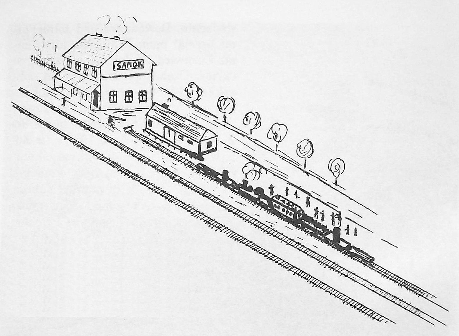 Pociąg pancerny "Kozak" przy stacji kolejowej Sanok. Autor rysunku: Antoni Hora